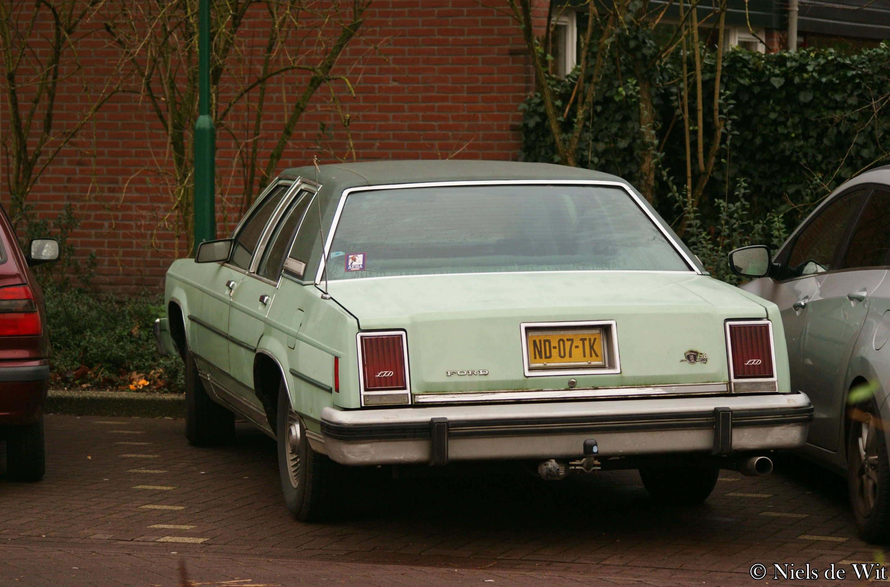 ND-07-TK